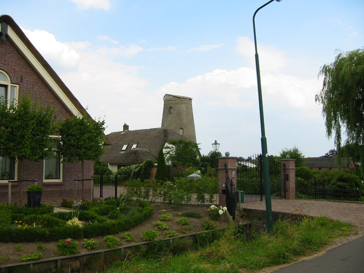 Geesina/ Ten-Bruggencatenummer: 01148: Romp van ronde stenen stellingmolen (opmerking: Foto gemaakt in het kader van het project Actualisering Monumentenregister (AMR).)